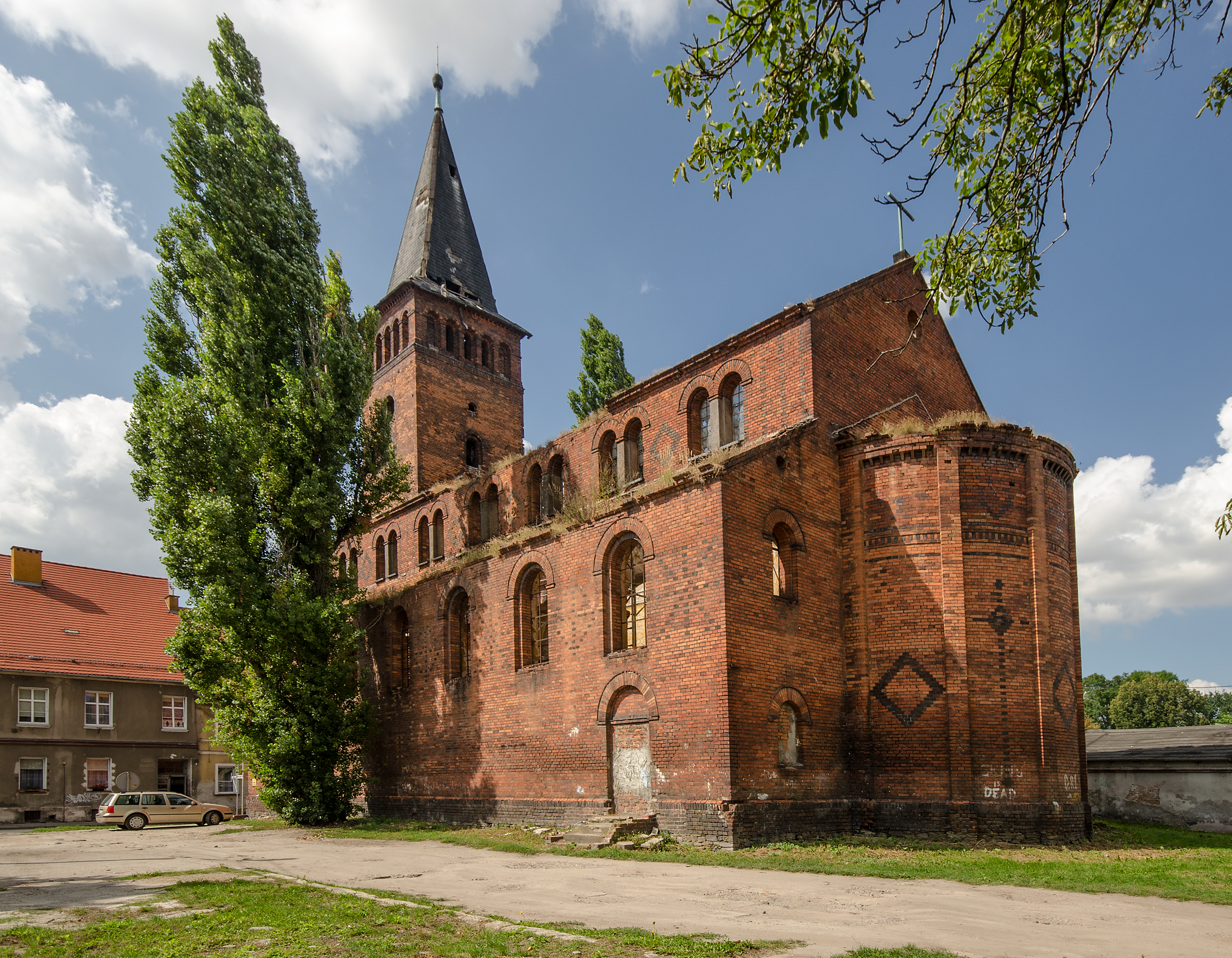 Grodków, kościół ewangelicki, 1845-1846